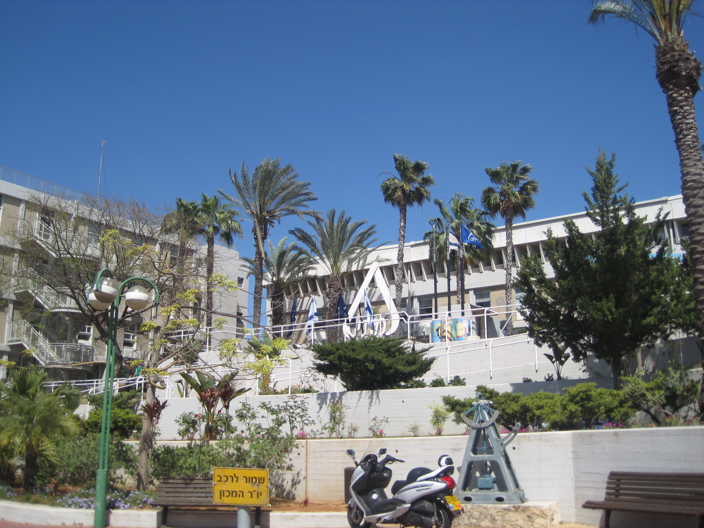 מכון התקנים הישראלי